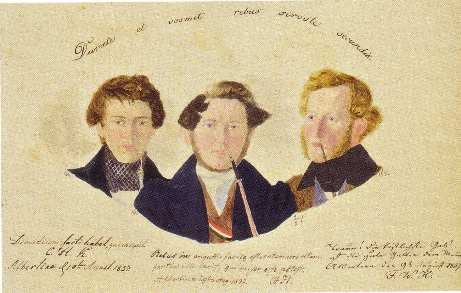 Porträtaquarelle von Carl Heinrich Krauß, Carl Albrecht Hillenberg und Wilhelm Harbrucker als Angehörige der Corpslandsmannschaft Littuania